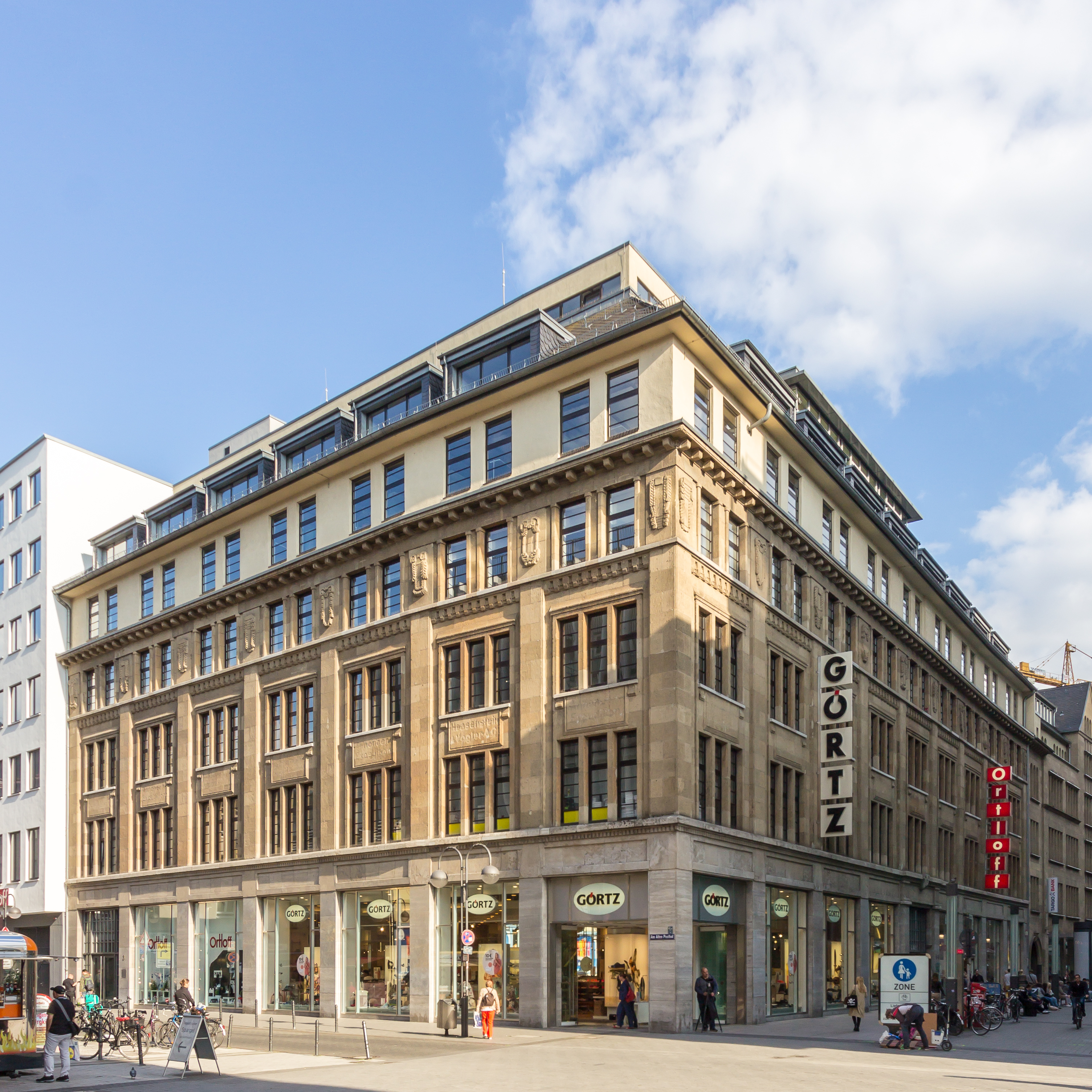 Geschäftshaus ehem. Kaufhaus Isay, Zeppelinstr. 4-8, Köln. Ansicht von der Nordseite (Am Alten Posthof}. Im Erdgeschoss befindet sich eine Filiale des Schuhgeschäfts Görtz.